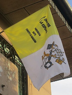 Papa Francisco bandera en honor a su visita en Iquitos, colocada por el Vicariato apostólico